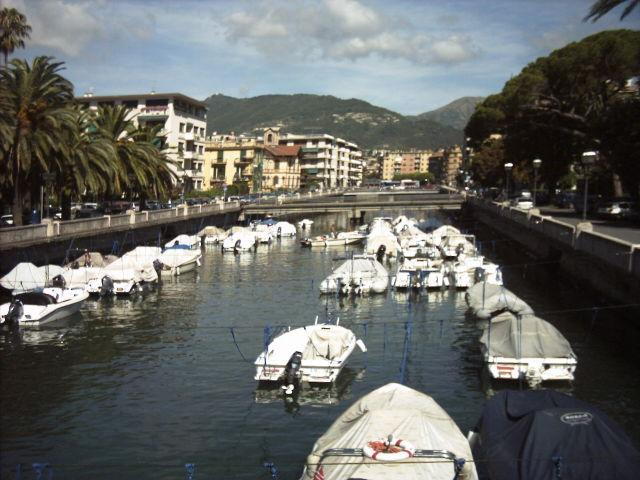 Torrente Boate, Rapallo, Liguria, Italia